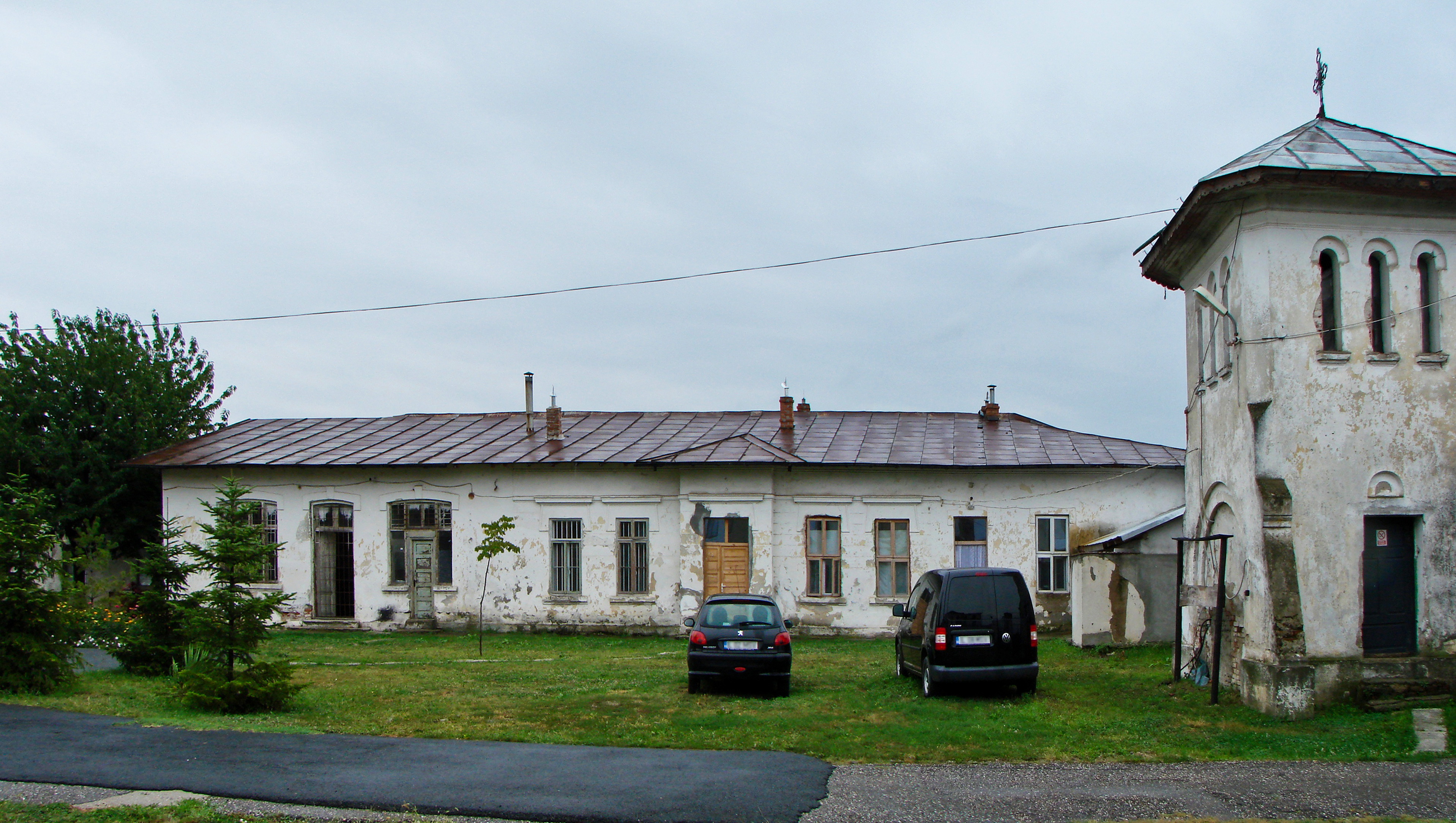 Construcții anexe în incinta mănăstirii Plătărești, judeţul Călăraşi, România 04